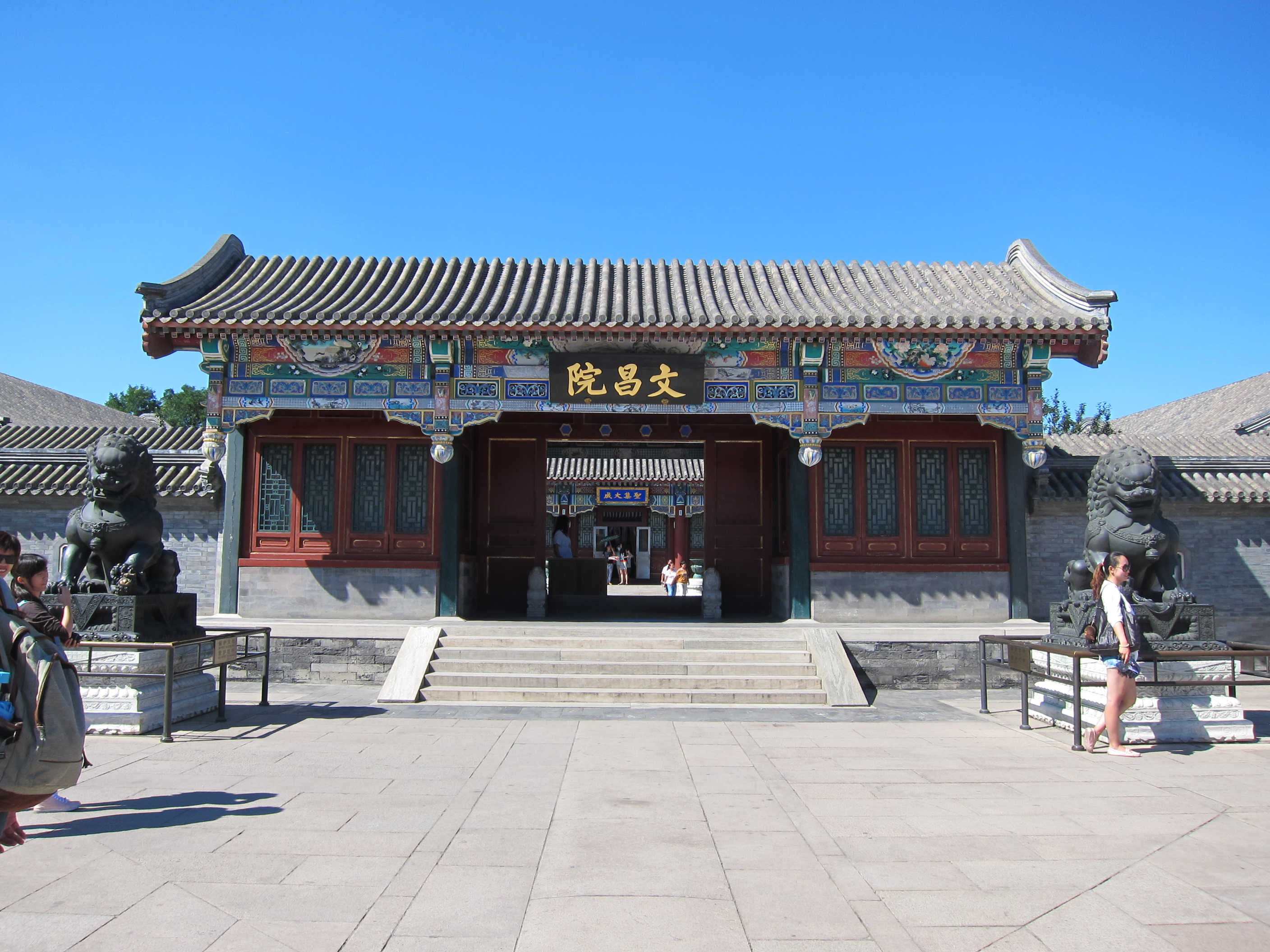 夏季的頤和園文昌院中文（中国大陆）: 夏季的颐和园文昌院